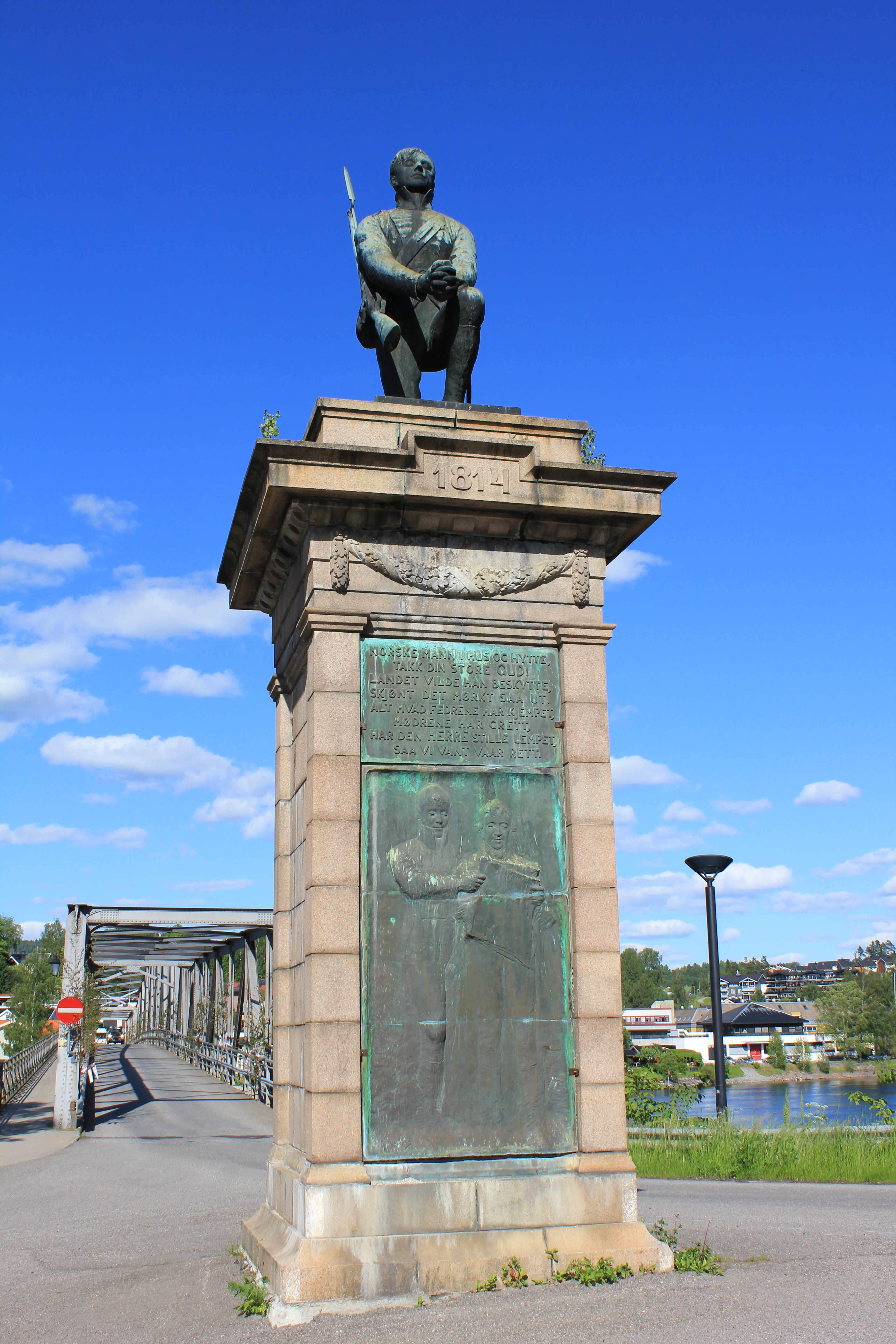 Grunnlovsstatue ved Eidsvoll, Den knelende soldat av Gustav Lærum. Avduket i 1928.